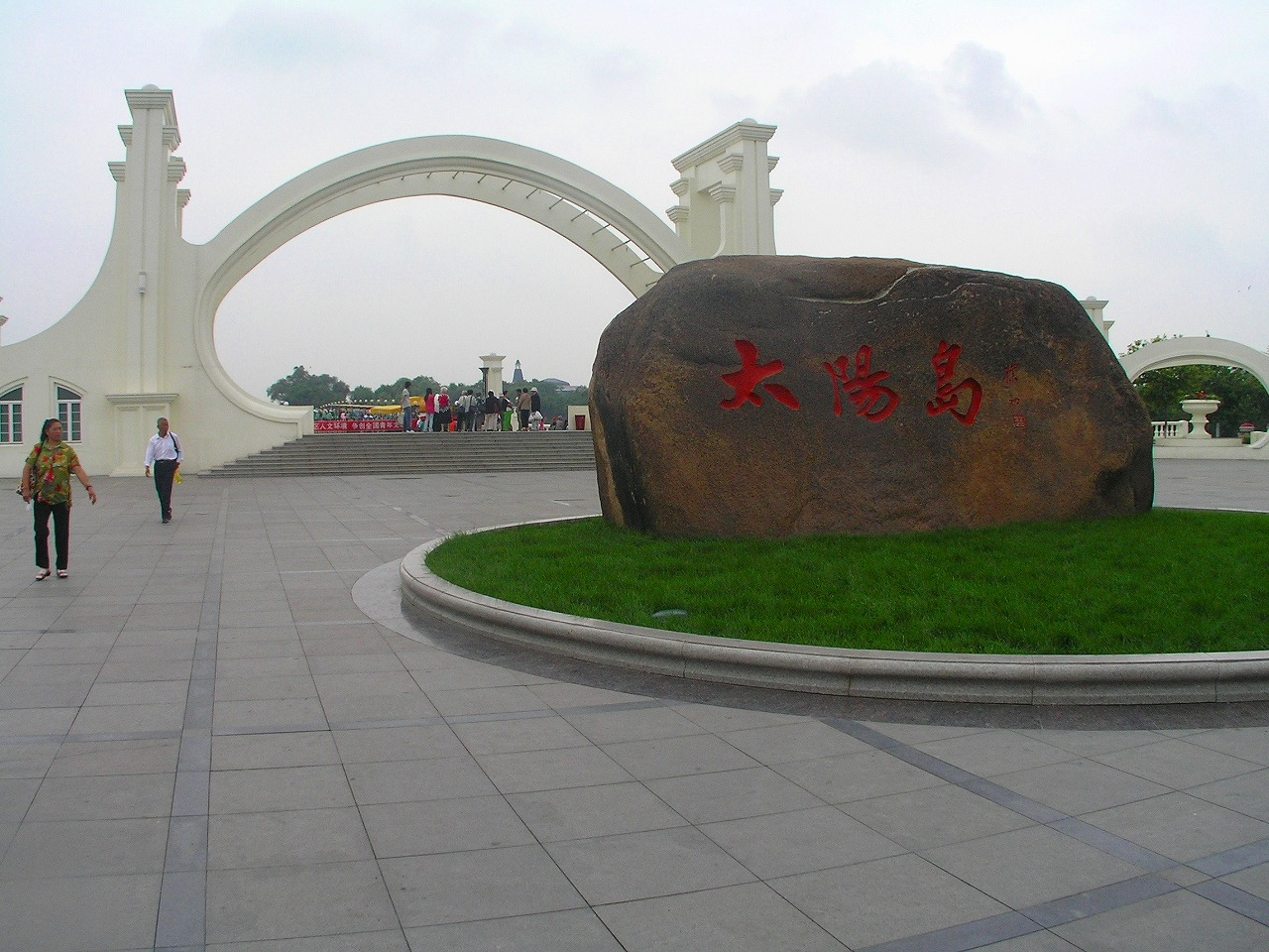 太陽島公園の入り口に置かれている巨大な石。鄭緒嵐の「太陽島上」（麗しの太陽島で）のヒット以来、観光客の急増が著しくそれに応える形でひとつの石碑に建てられた。黒竜江省展覧館はひとつの石碑を運んできて1984年に有名な書家である趙朴初（zh）により「太陽島」の3文字が刻まれた。長さは7.5m、厚み2ｍ、高さ4.3ｍ、重さは約150tである。